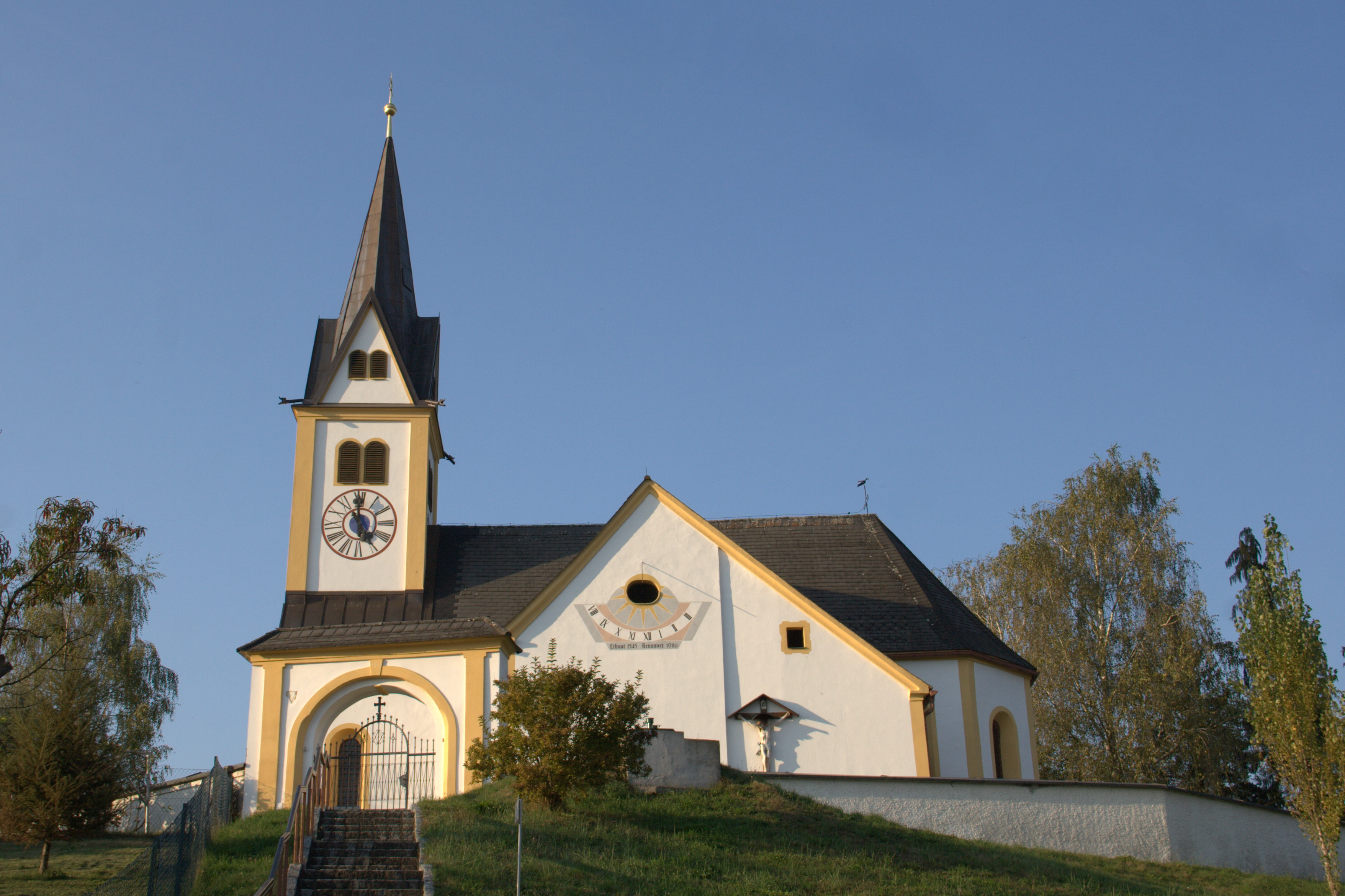 Kath. Filialkirche hl. Oswald und Ummauerung